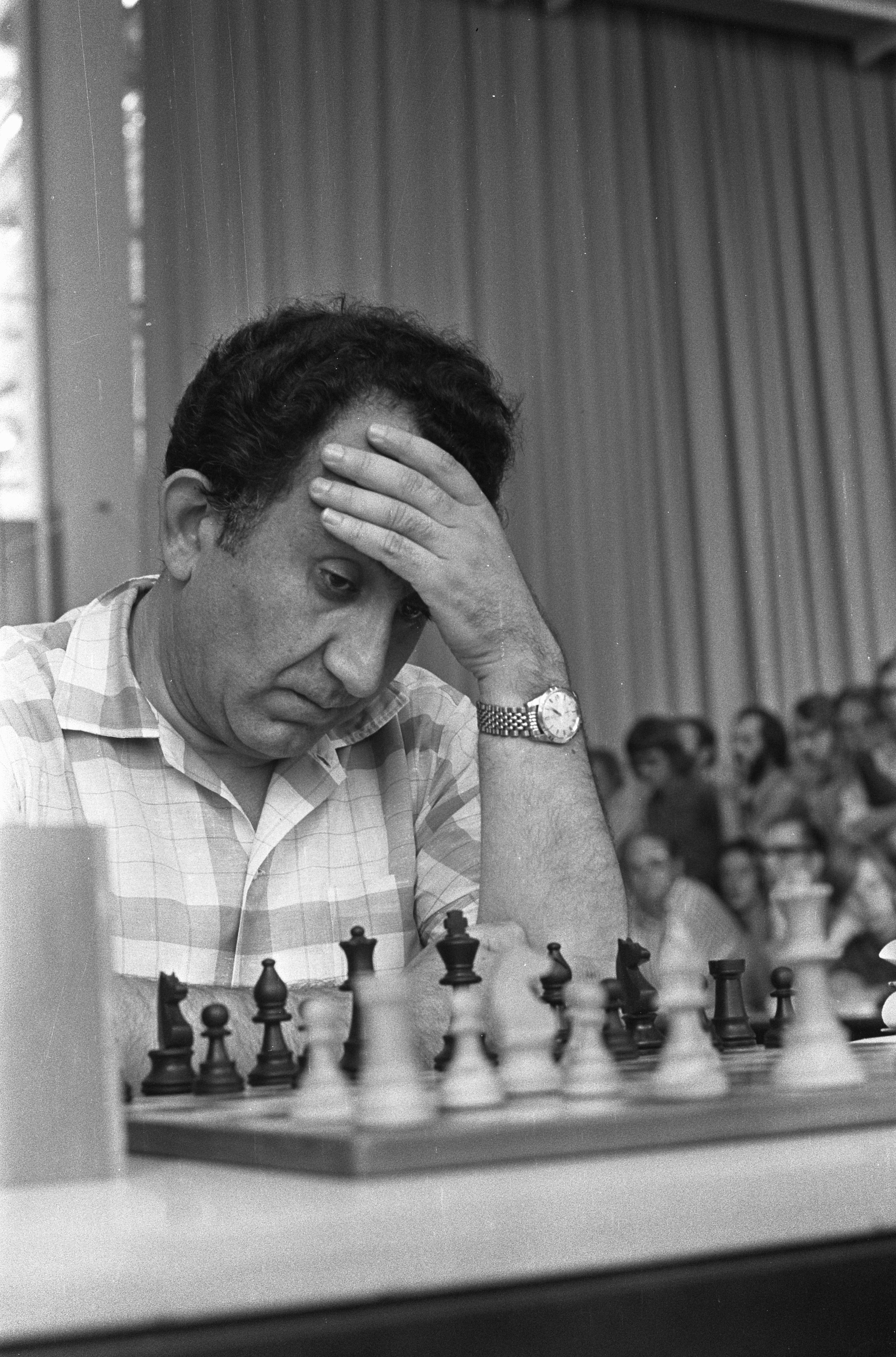 Collectie / Archief : Fotocollectie Anefo Reportage / Serie : [ onbekend ] Beschrijving : IBM-schaaktoernooi, Petrosjan achter bord Datum : 2 augustus 1973 Trefwoorden : schaken Persoonsnaam : Petrosian, Tigran Instellingsnaam : IBM-Schaaktoernooi Fotograaf : Punt, […] / Anefo Auteursrechthebbende : Nationaal Archief Materiaalsoort : Negatief (zwart/wit) Nummer archiefinventaris : bekijk toegang 2.24.01.05 Bestanddeelnummer : 926-5876